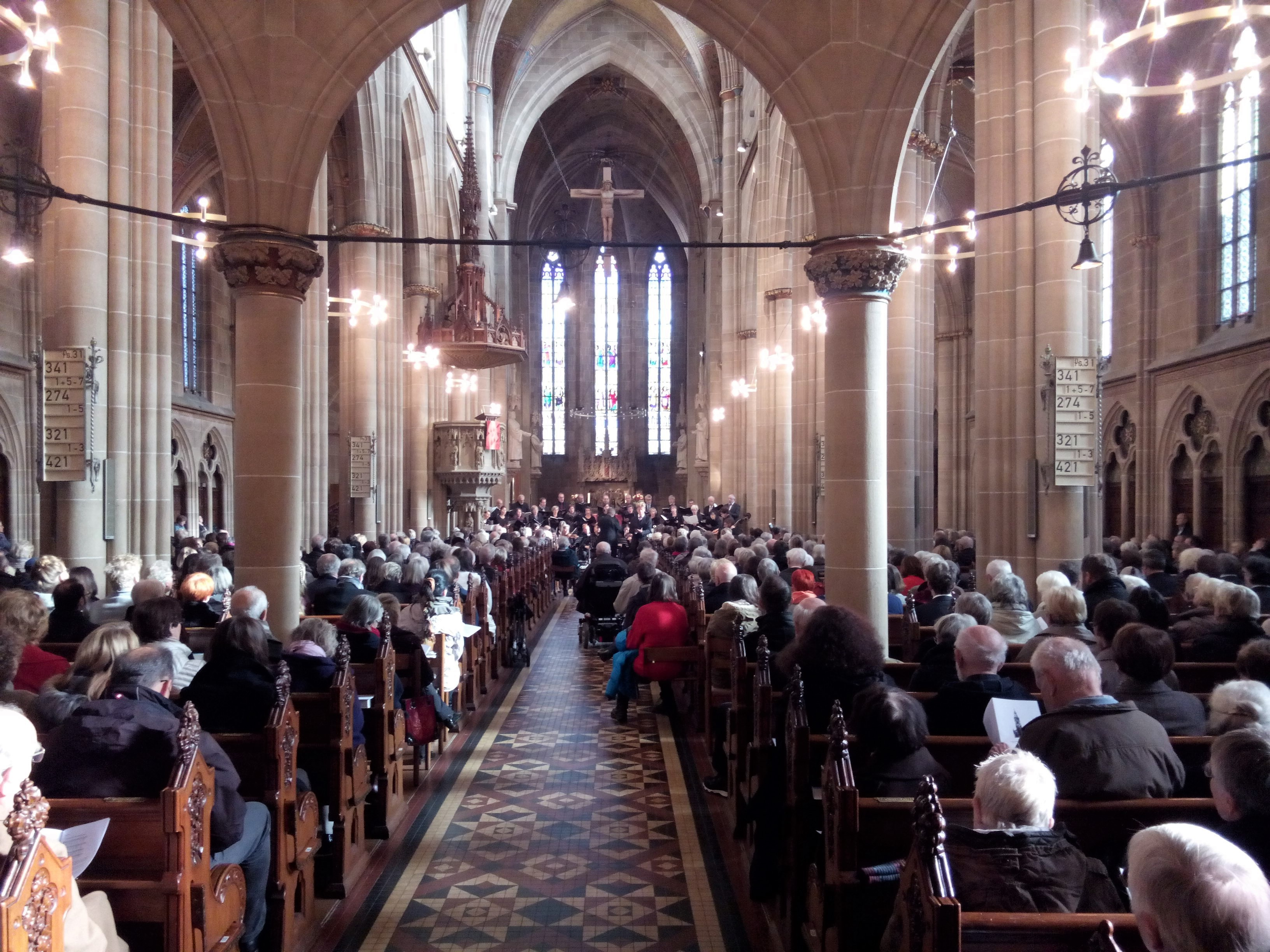 Festgottesdienst am 31.10.2017 in der Marienkirche Reutlingen anlässlich des 500. Reformationsjubiläums